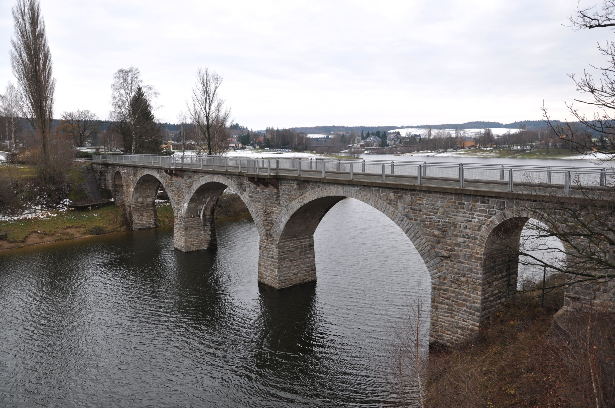 Eisenbahnbrücke über den Bormannsgrund in Malter, Weißeritztalbahn